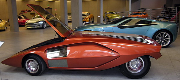 Lancia Stratos Prototyp Zero im Bertone Museum